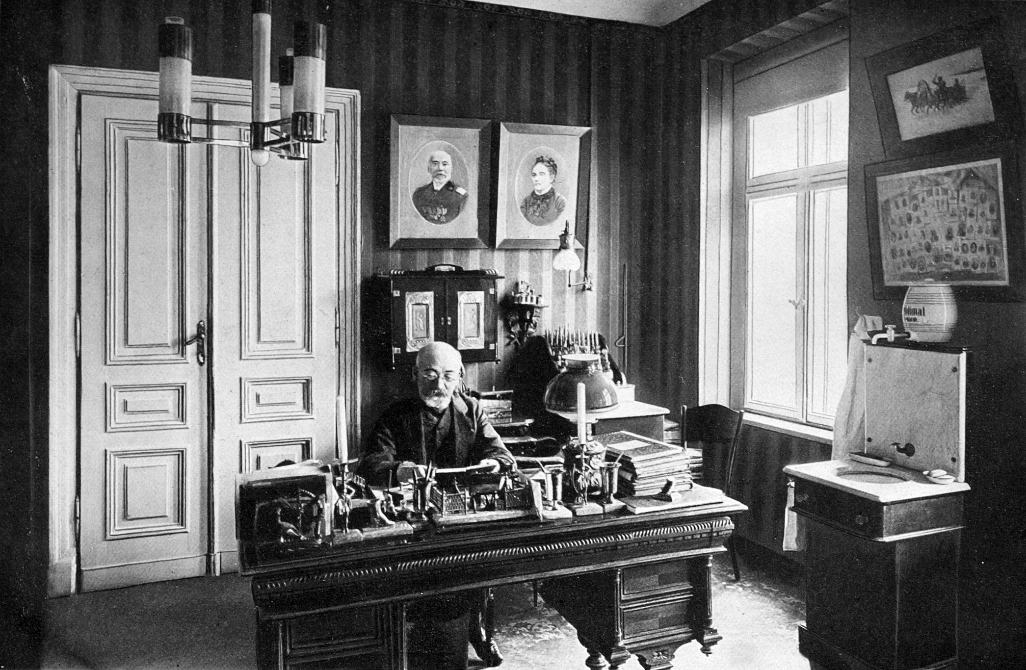 Ludwik Zamenhof w Gabinecie, 1910 r.